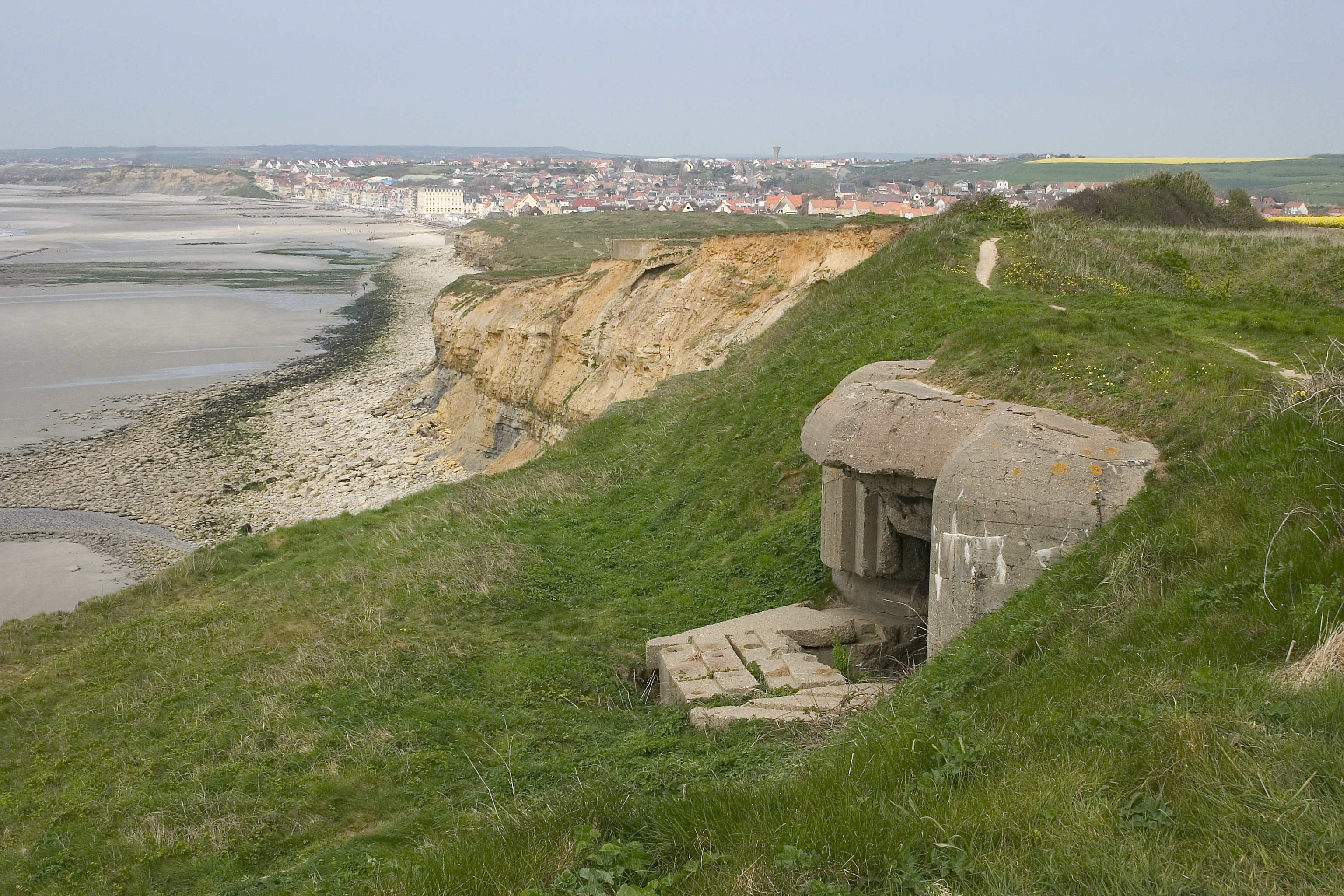 Restes du mur de l'atlantique au fort de la crèche à Wimereux